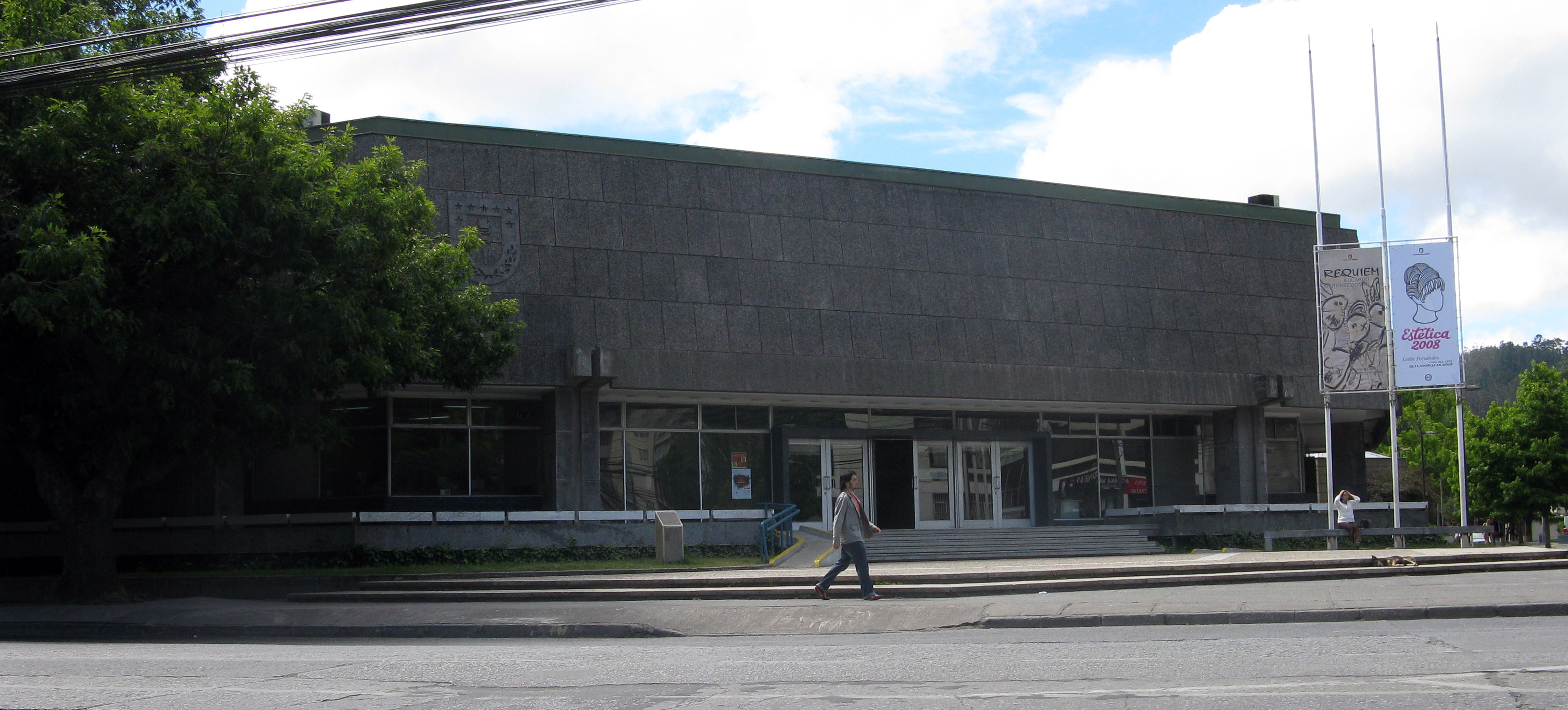 Fotografía del frontis de la "Casa del Arte" de la Universidad de Concepción, museo de la ciudad de Concepción, Chile. Donde se sustenta la Pinacoteca que posee, junto con el Museo Nacional de Bellas Artes de Santiago, la colección de pinturas chilenas más grande del país.